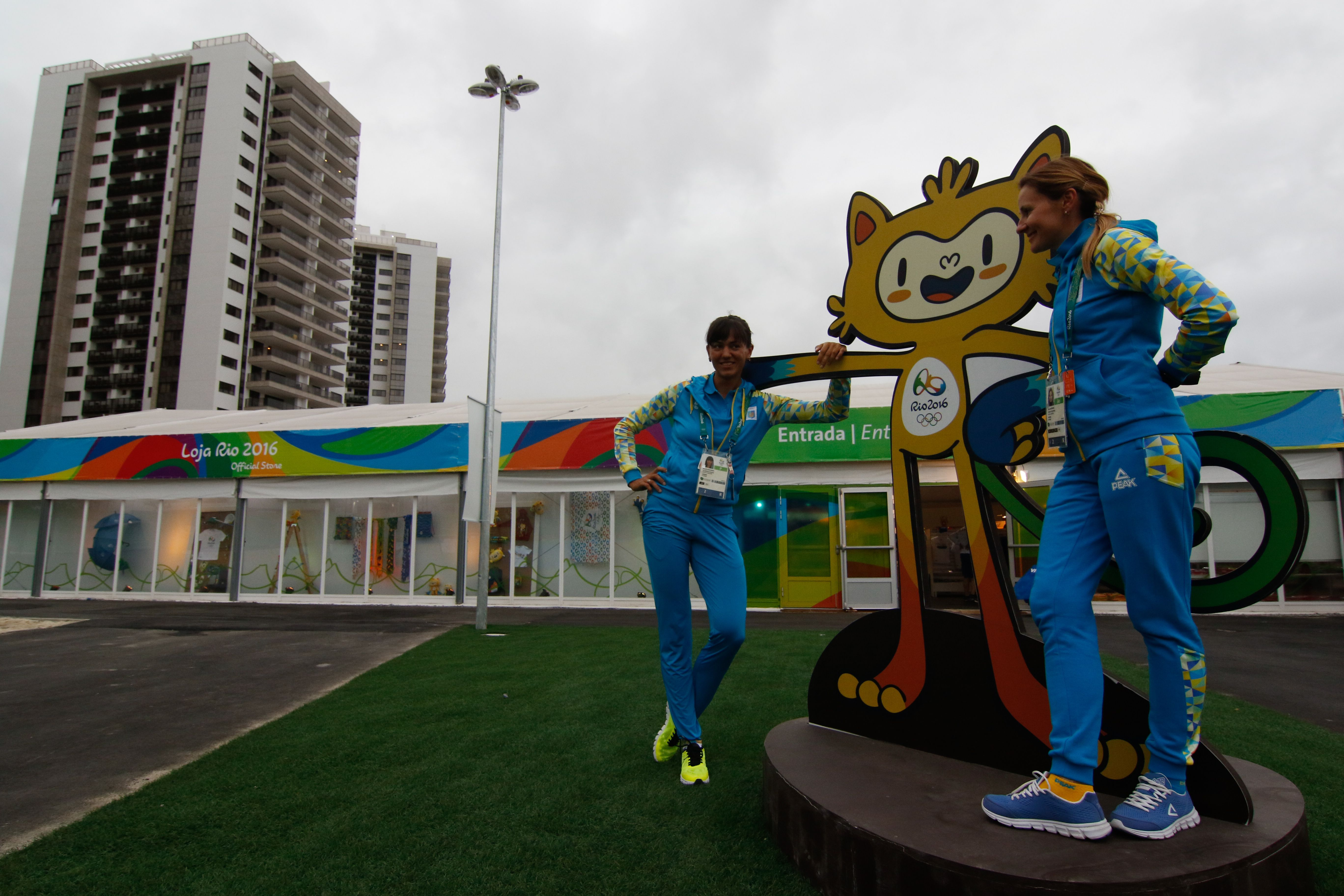 Rio de Janeiro - Atletas da seleção de remo da Ucrânia tiram fotos com mascote na Vila Olímpica dos Jogos Rio 2016, na Barra da Tijuca